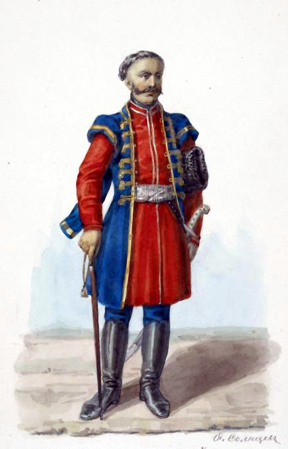 Старшина Донського Війська 1821.